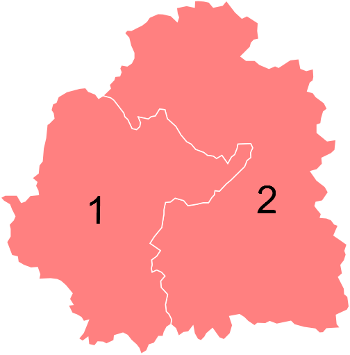 Résultats des élections législatives de l'Indre en 2012